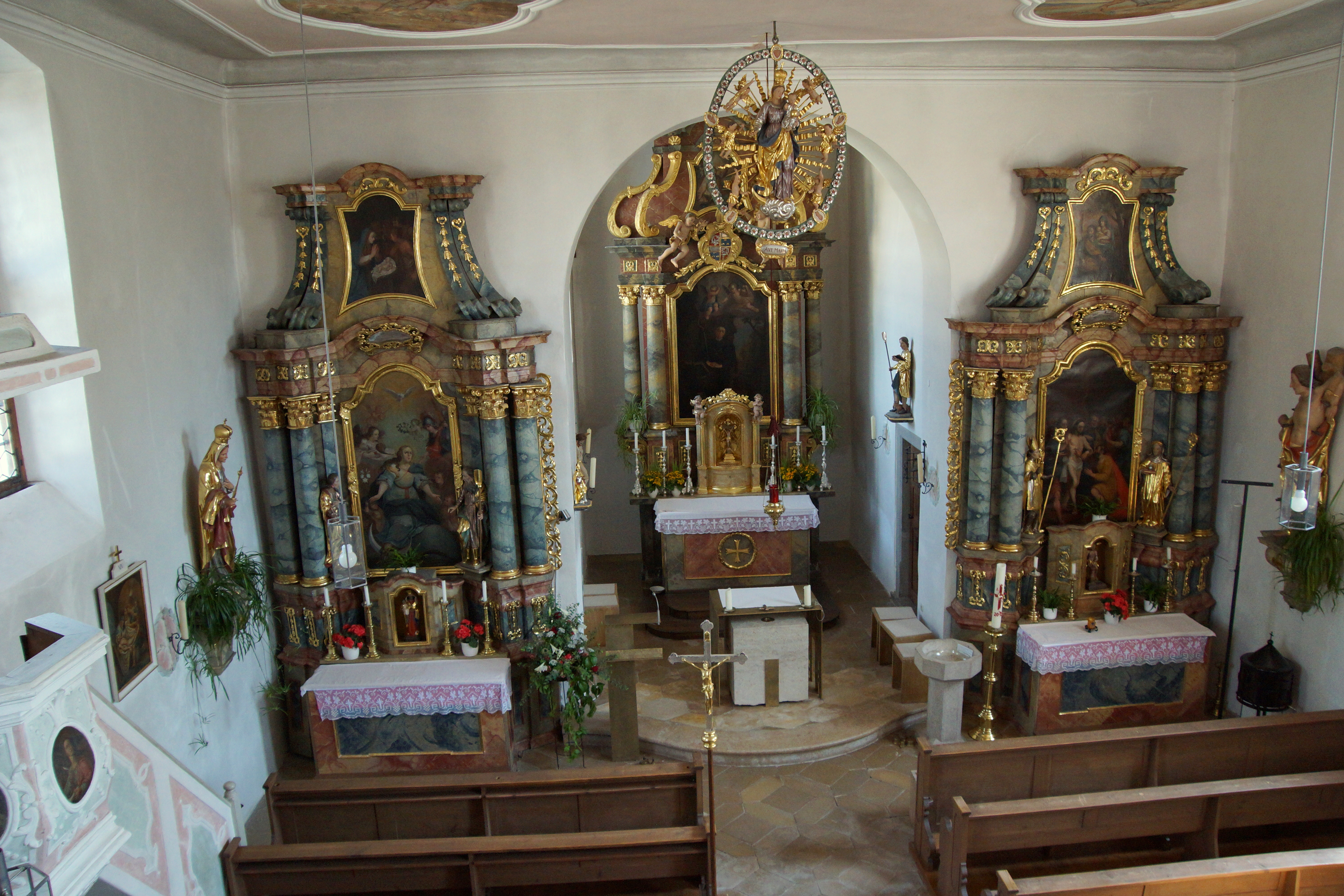 Die katholische Wehr- und Pfarrkirche im Juraort Röckenhofen bei Greding